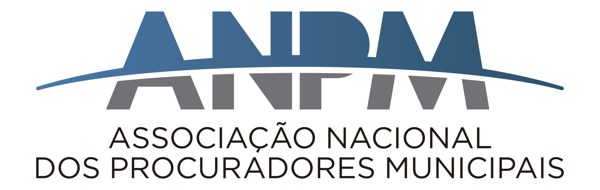 Logomarca da Associação Nacional dos Procuradores Municipais